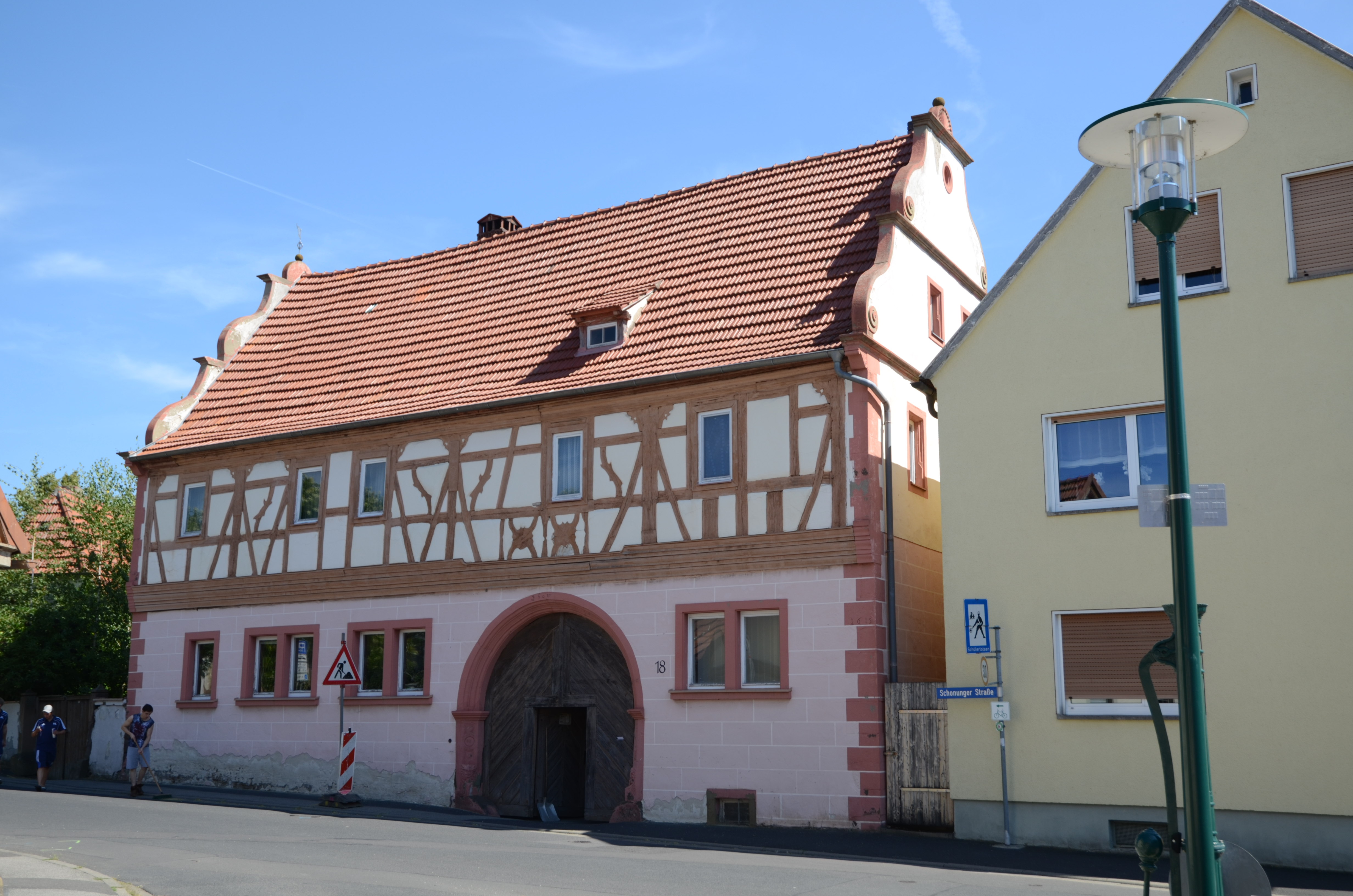 Gochsheim, Schonunger Straße 18